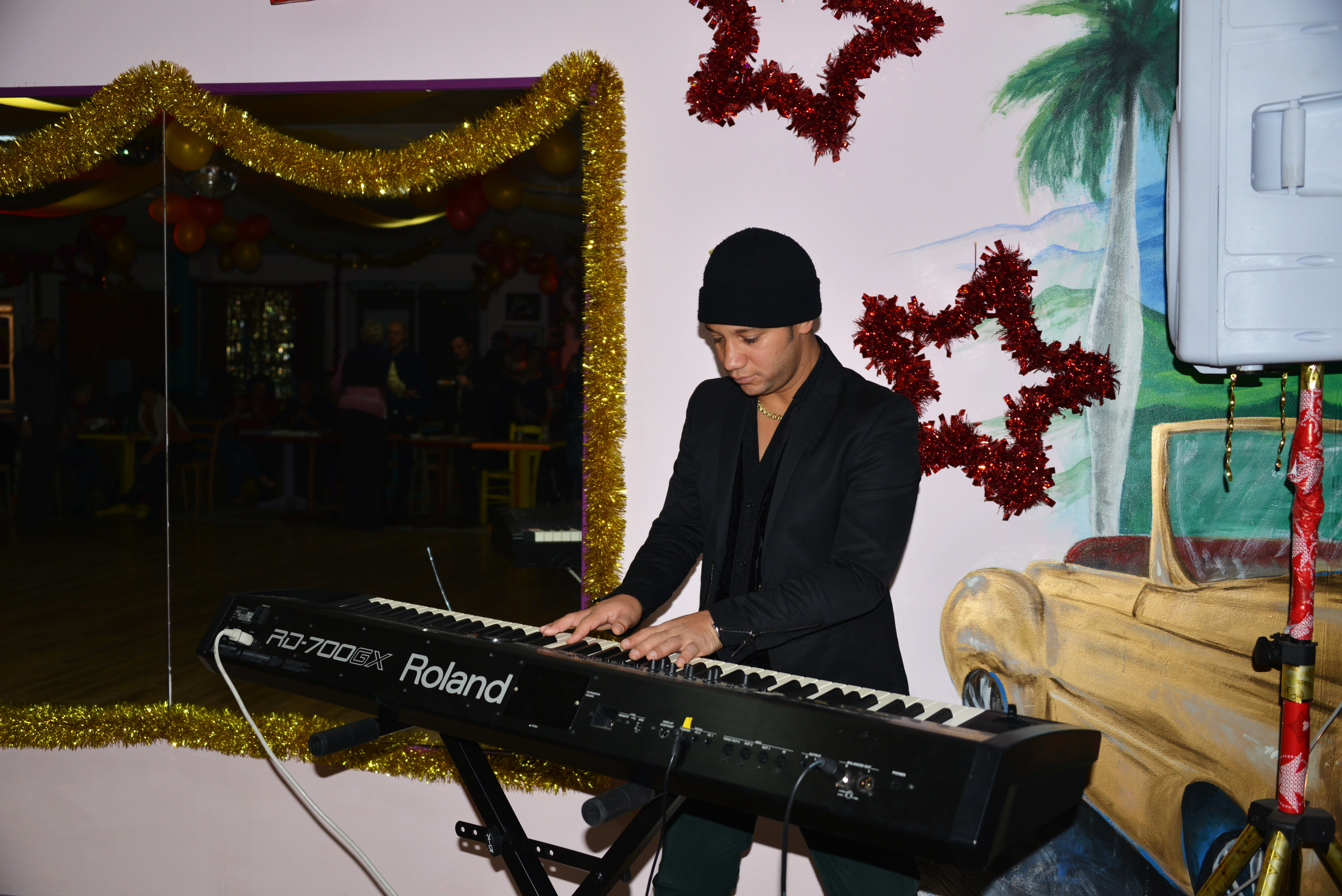 Maikel Blanco Cuevas au Cuba Tropicana à La Rochelle en janvier 2013. Maikel Blanco au clavier. Soirée dansante au Cuba Tropicana en l’ honneur de Maikel Blanco Cuevas (Maykel Blanco) venu en France pour la présentation de son nouvel album « A Toda Maquina » et la préparation de sa tournée de concerts en juillet 2013. Maikel Blanco est un auteur-compositeur cubain de timba. Le Cuba Tropicana est un établissement d’ enseignement des danses latines et un bar géré par Rey Martinez Piloto et Deborrah Fronteau. La Rochelle, Charente Maritime, France.